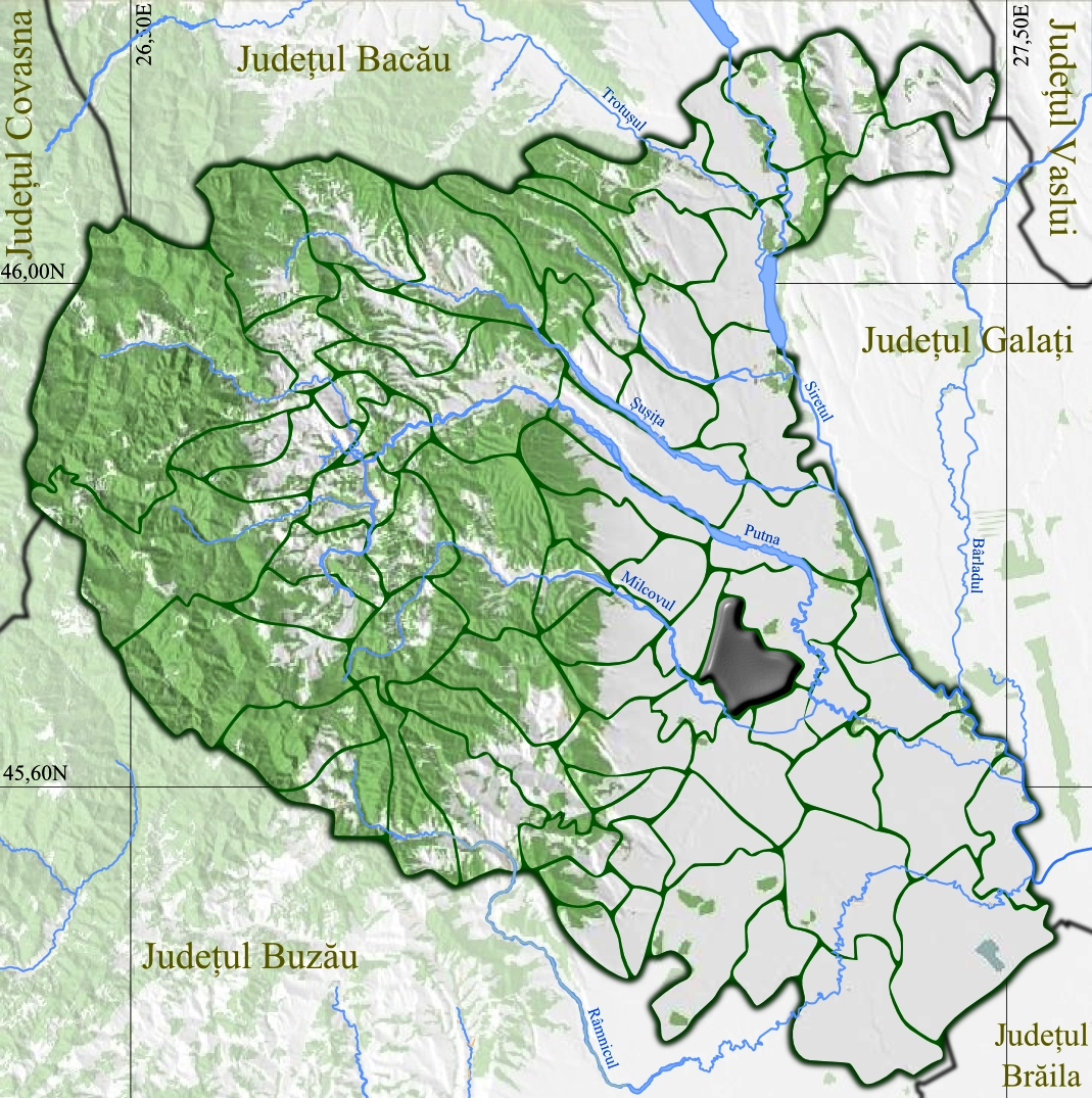 Focsani jud Vrancea.